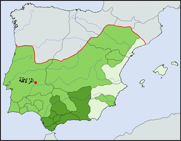 موقع معركة الزلاقة